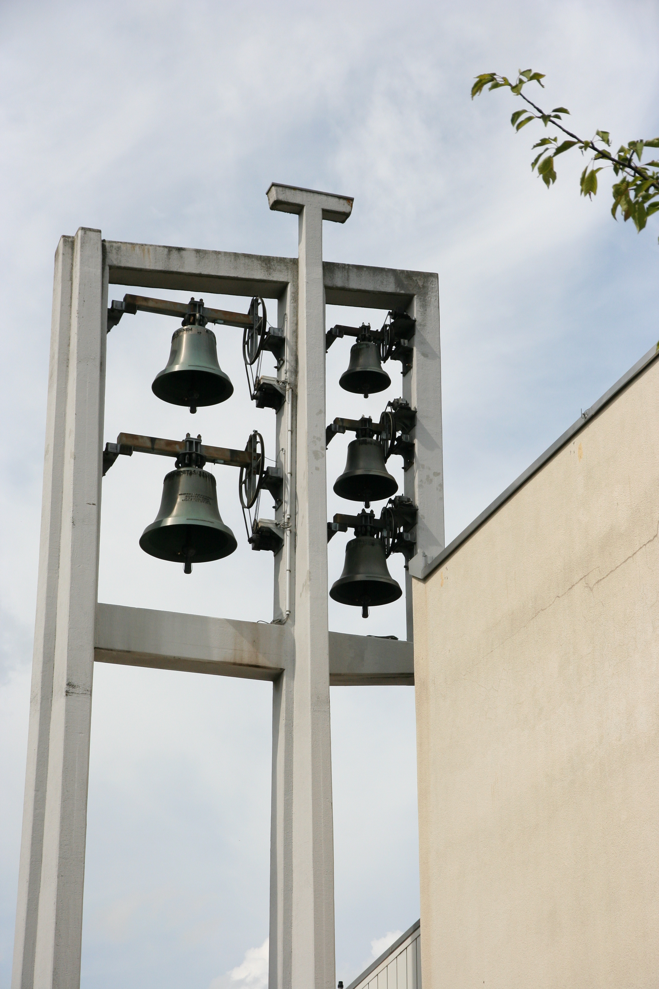 Römisch-katholische Pfarrkirche Bruder Klaus Biel